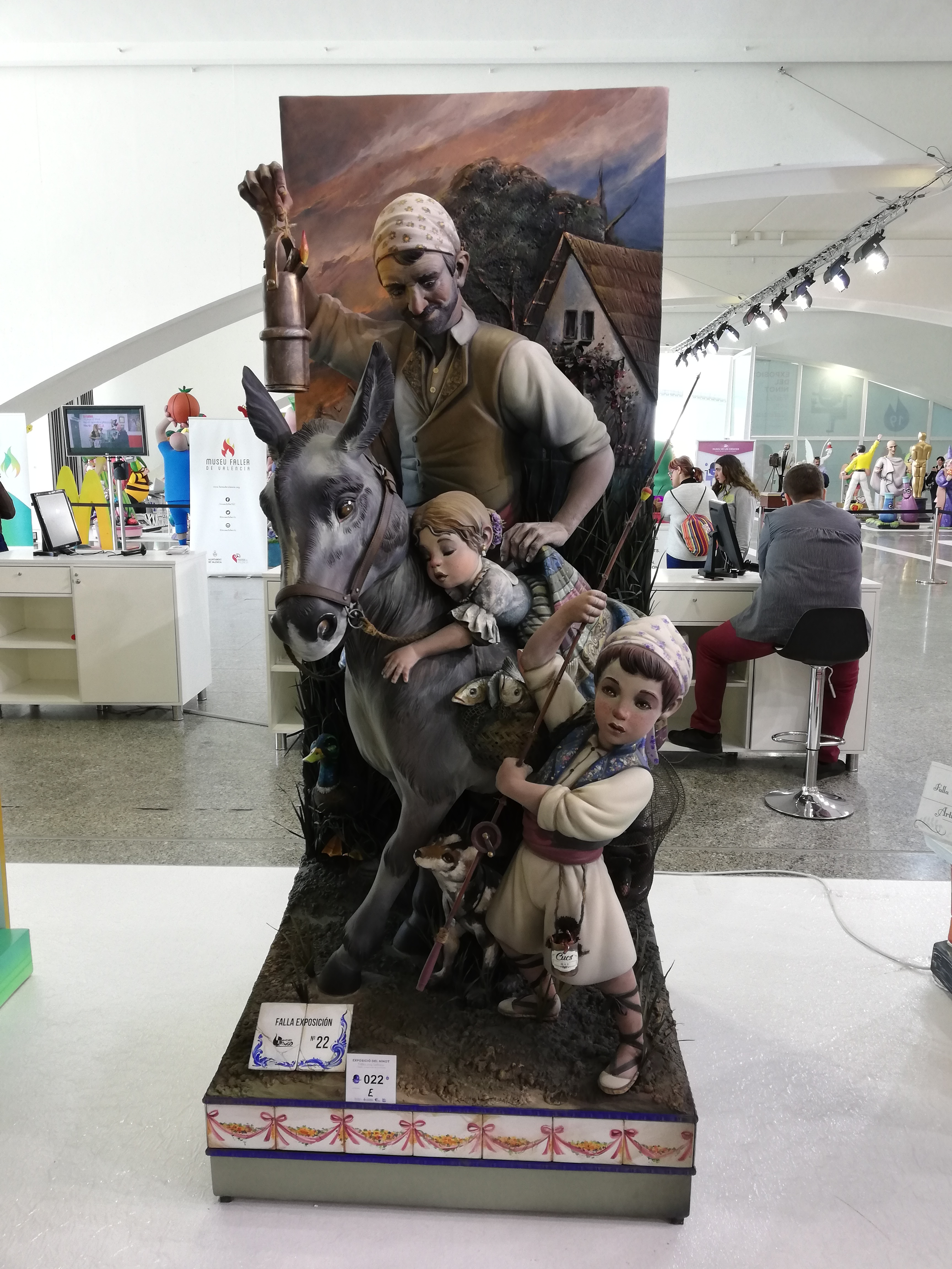 Ninot Indultat de les Falles de València 2019, de David S. Llongo durant l'Exposició del Ninot